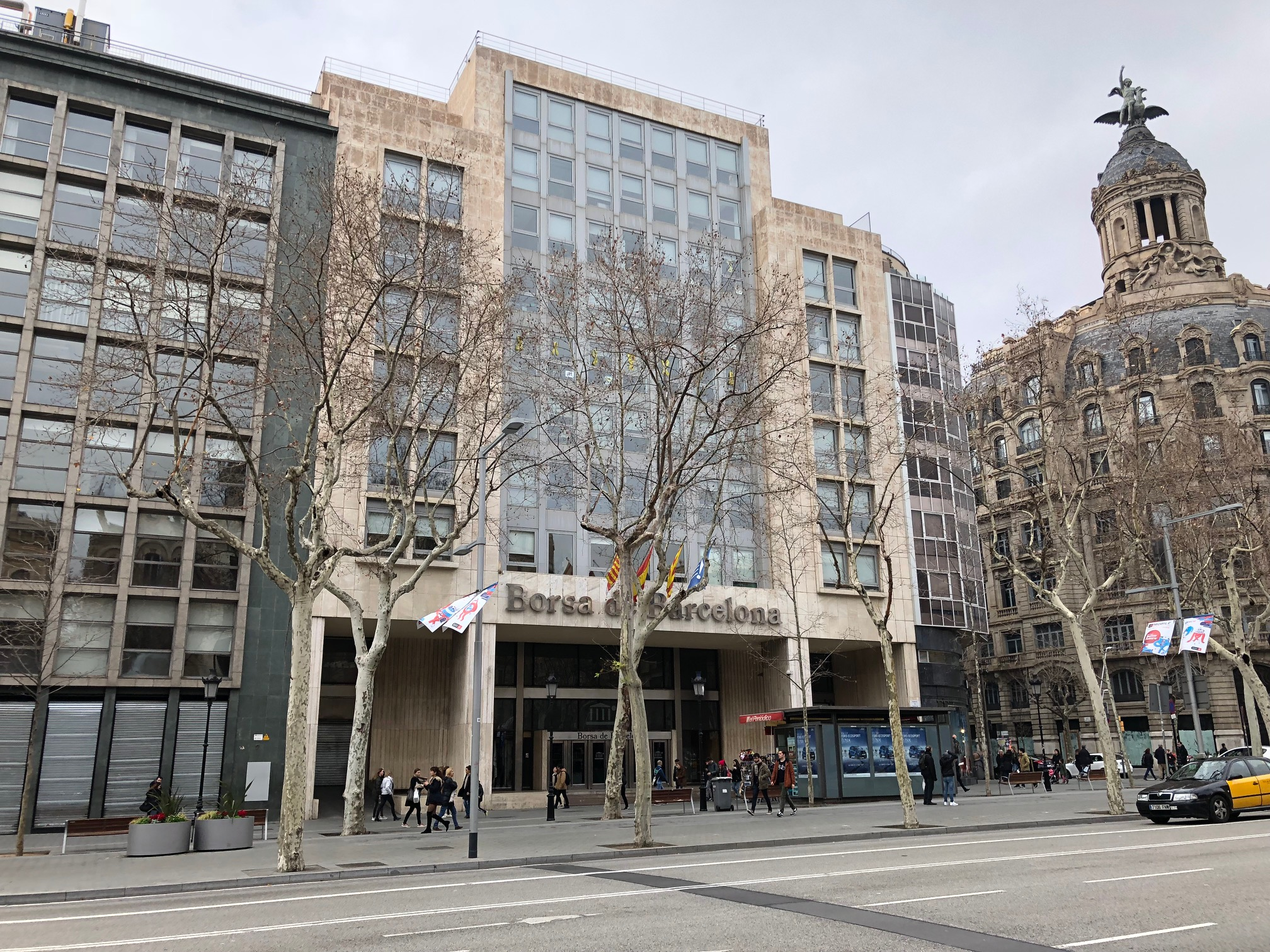 Edifici de la Borsa de Barcelona (Passeig de Gràcia)